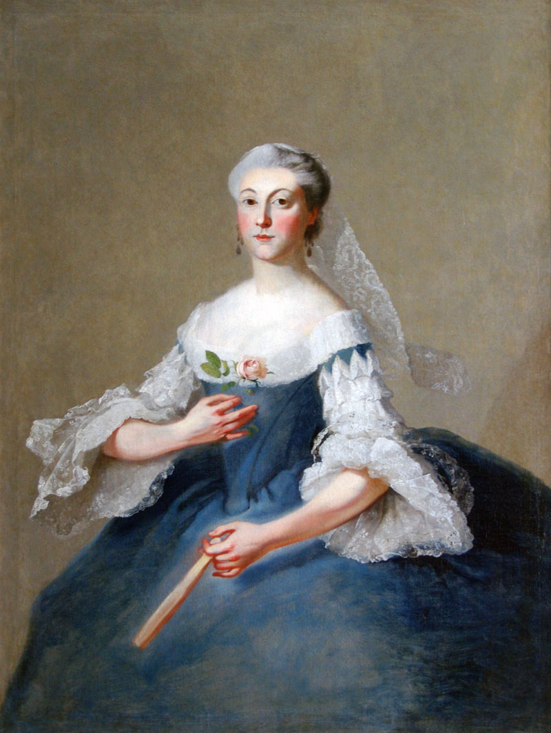 Vorontsovalabel QS:Lru,"Графиня Мария Артемьевна Воронцова, ур. Волынская (1725-1792)" label QS:Len,"Vorontsova"